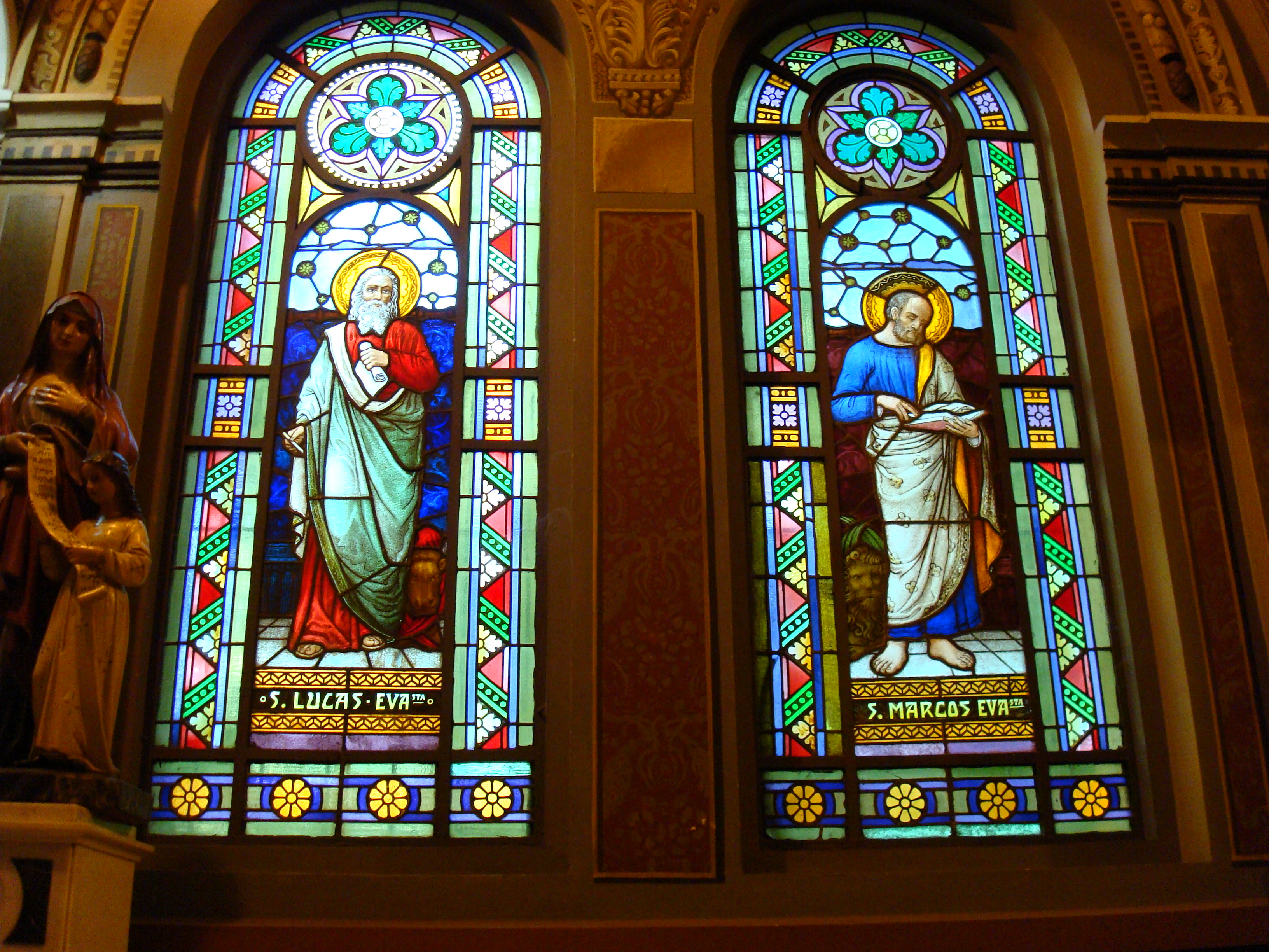 Vitral na igreja Catedral de Ribeirão Pretro